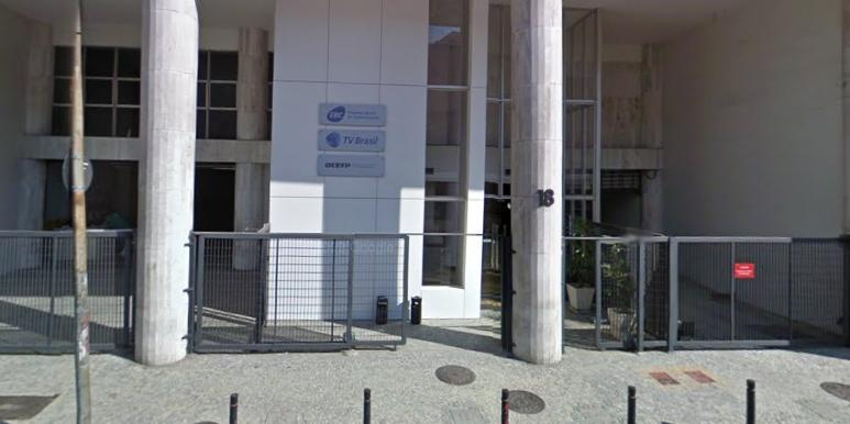 Sede da TV Brasil, na Lapa, na cidade do Rio de Janeiro.